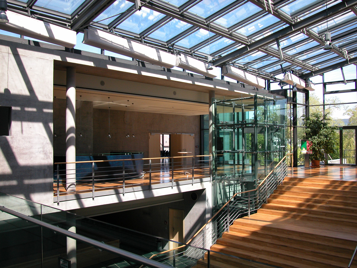 Moderne Architektur